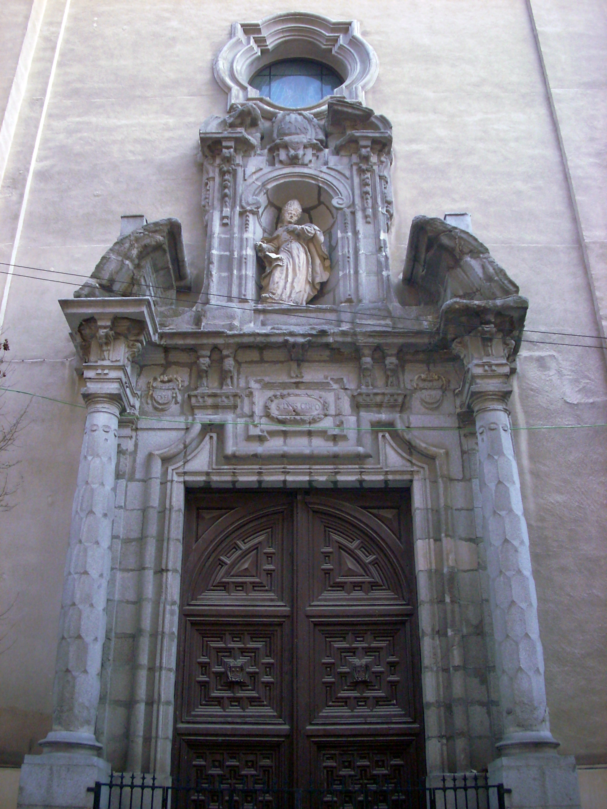 Fachada de la iglesia del Carmen Calzado, en Madrid, España.